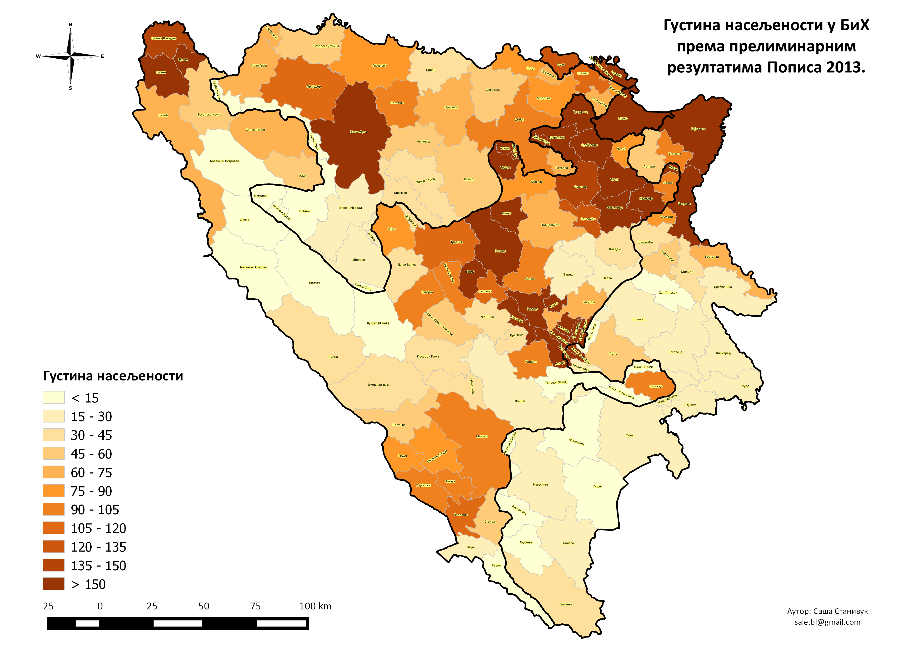 Српски (ћирилица): Густина насељености у БиХ према прелиминарним резултатима Пописа 2013.